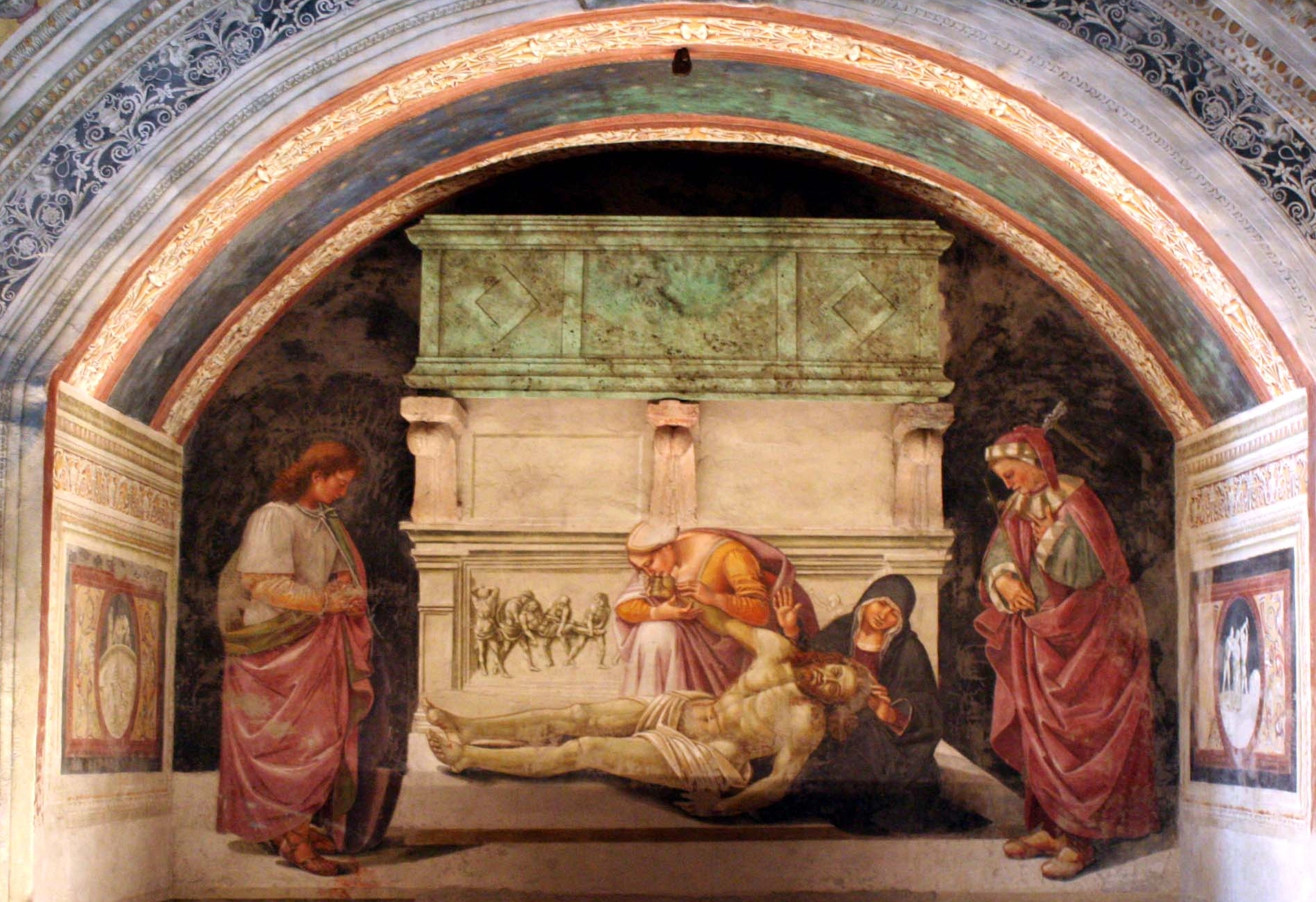 Die Grablegung Christi, Dom zu Orvieto